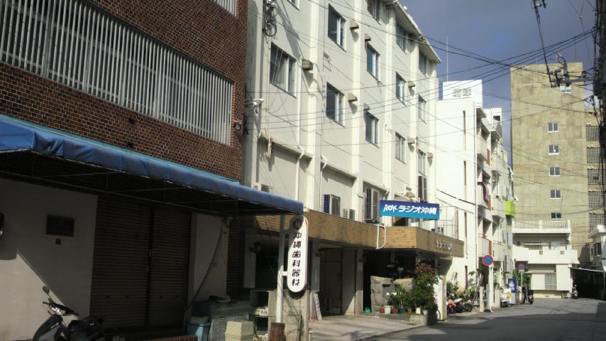 ラジオ沖縄社屋